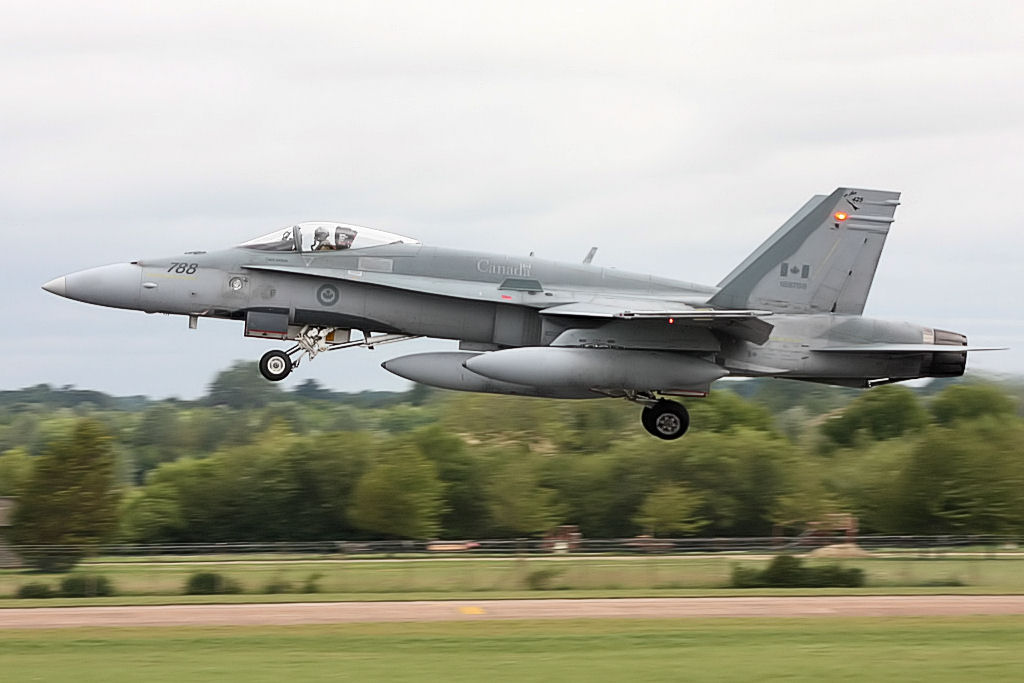 F18 - RIAT 2008